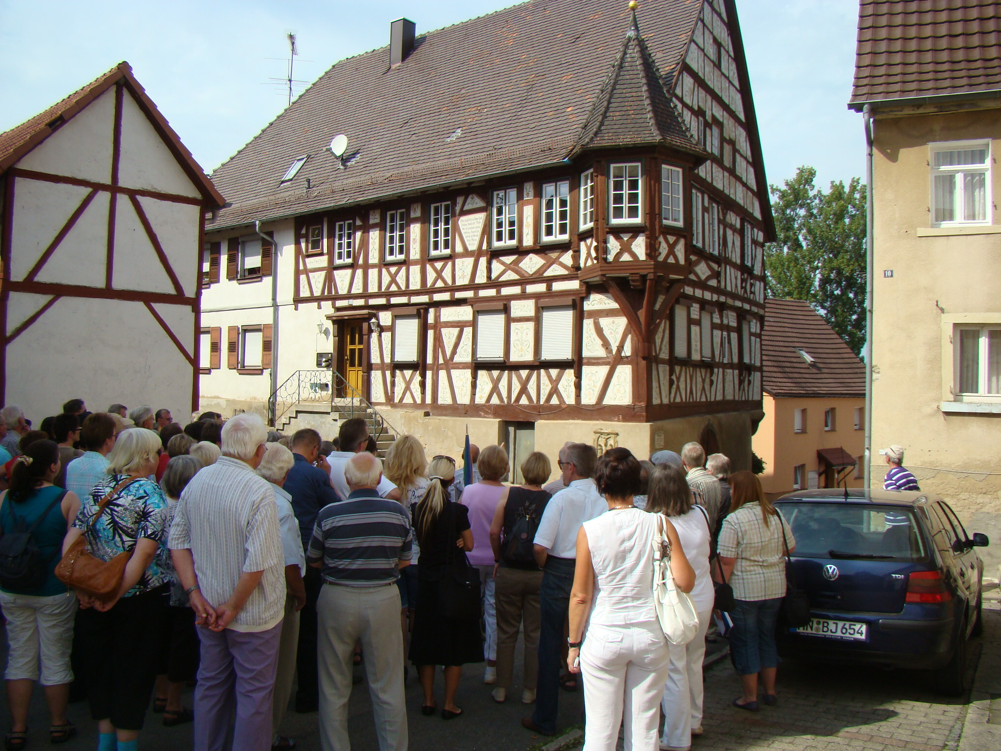 Witwenhaus in Oedheim beim Tag des offenen Denkmals 2011